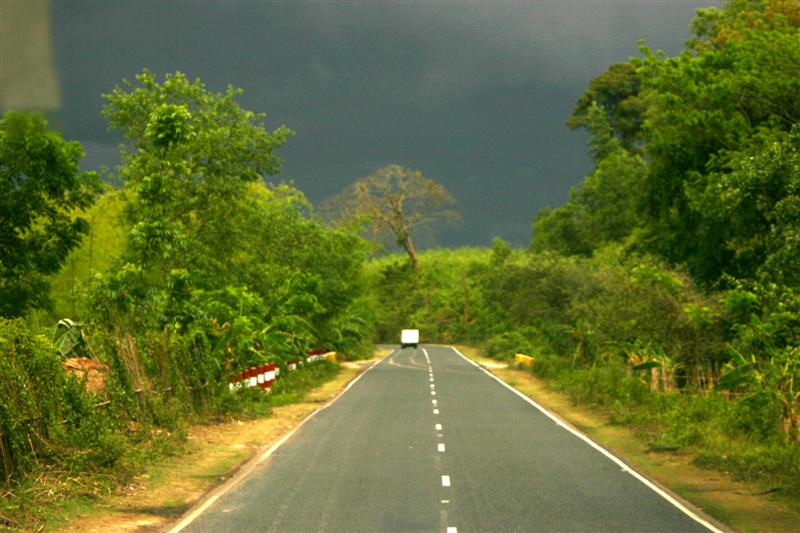 Dhaka Chittagong Road